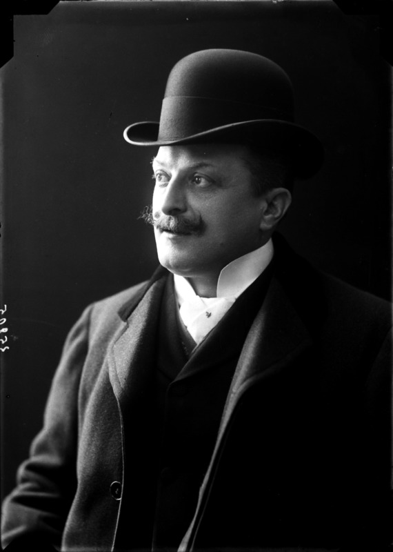 Ritratto del critico teatrale Adolfo Re Riccardi